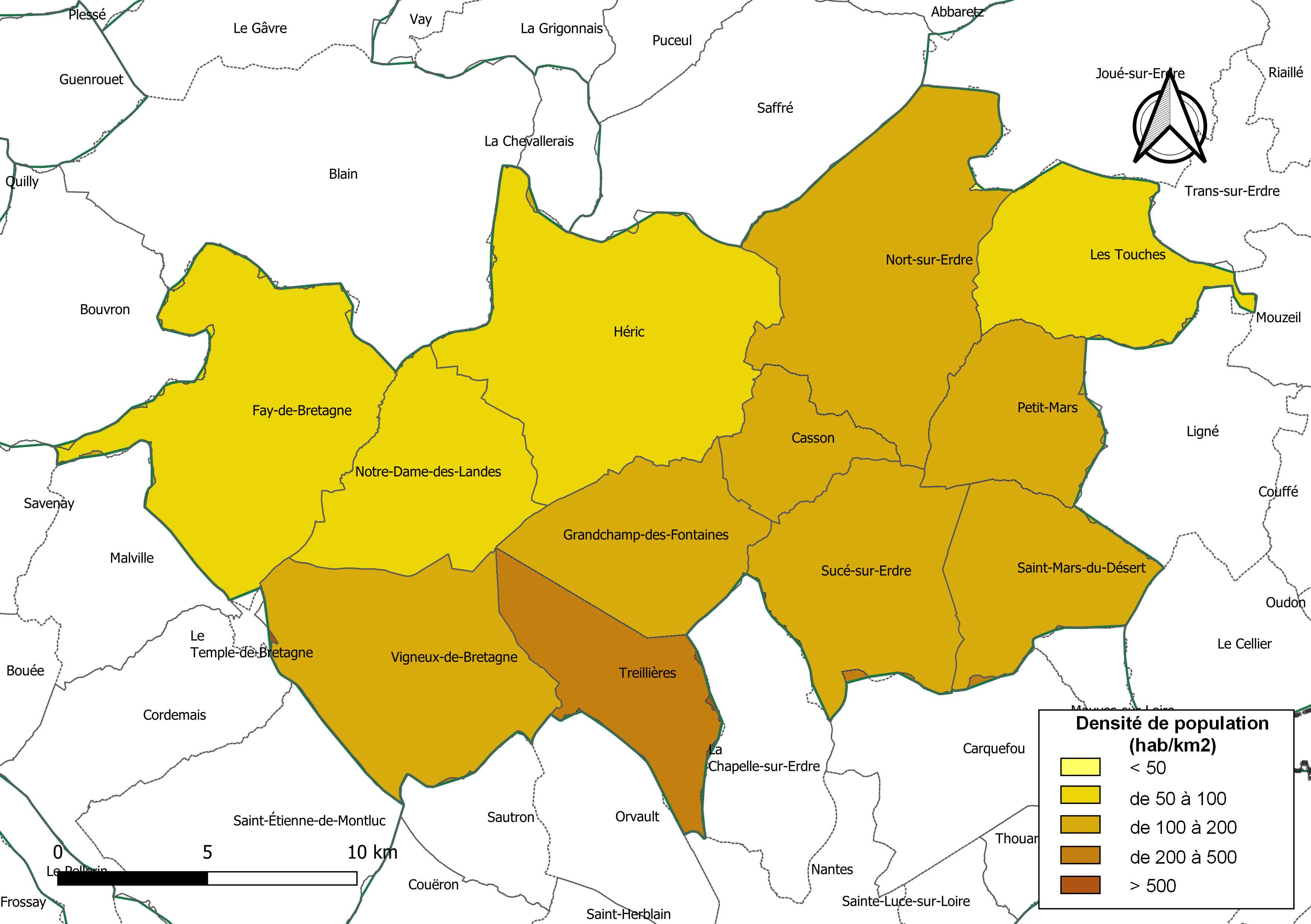 Carte des densités de population (millésimée 2016) des communes de la Communauté de communes d'Erdre et Gesvres, département de la Loire-Atlantique, France. Composition au 1er janvier 2019.